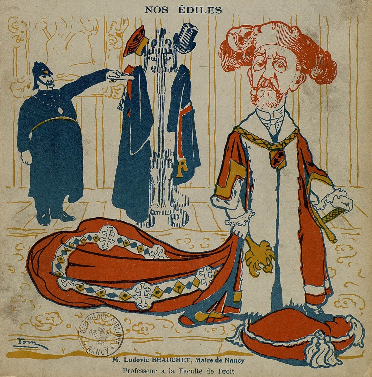 Caricature de Ludovic Beauchet, maire de Nancy.